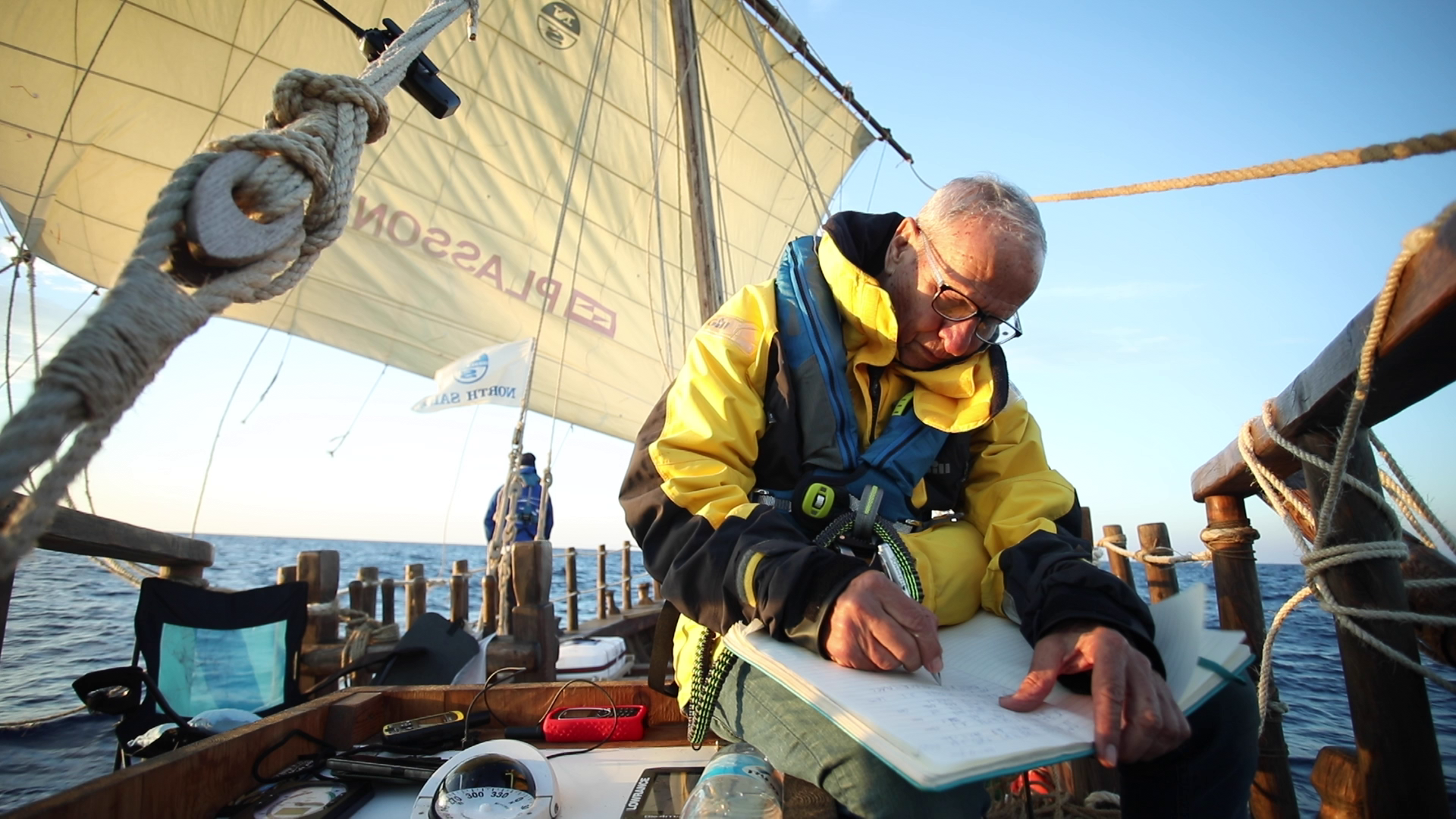 תיעוד שגרת ההפלגה ביומן הספינה בדרך לקפריסין